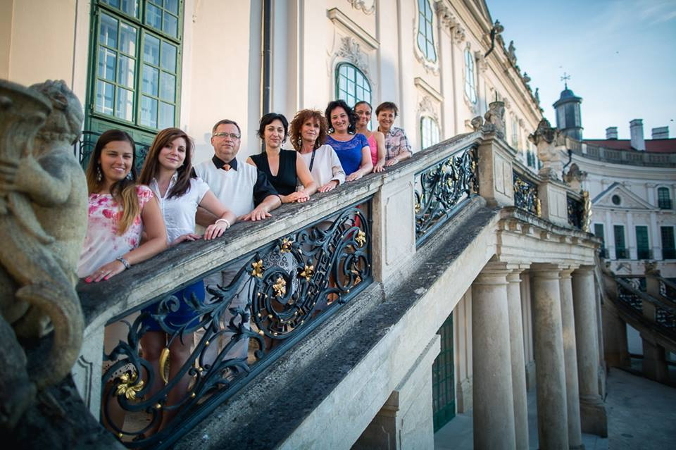 A 2014-es Régi Zenei Napok szervezői, Fertőd, Esterházy-kastély (A képen szereplő személyek balról jobbra: Horváth Nikolett, Szabó Lívia, Igric György, Veszprémi Krisztina, Gotai Veronika, Görög-Nagy Edina, Garai Ildikó, Liszkay Mária.)